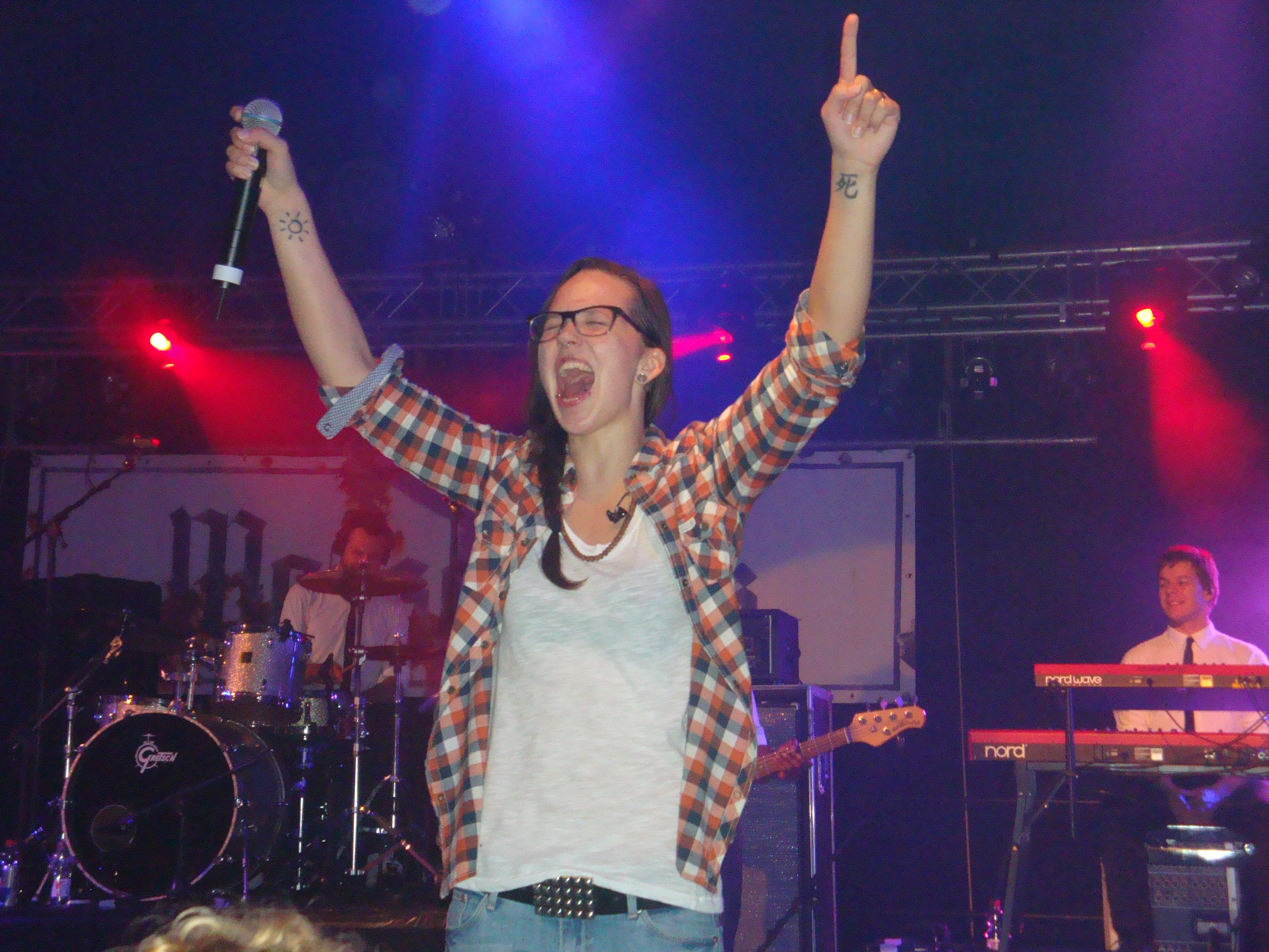 Stefanie Heinzmann während ihres Konzerts am 11. September 2010 in Hildesheim (Wasserwerk).